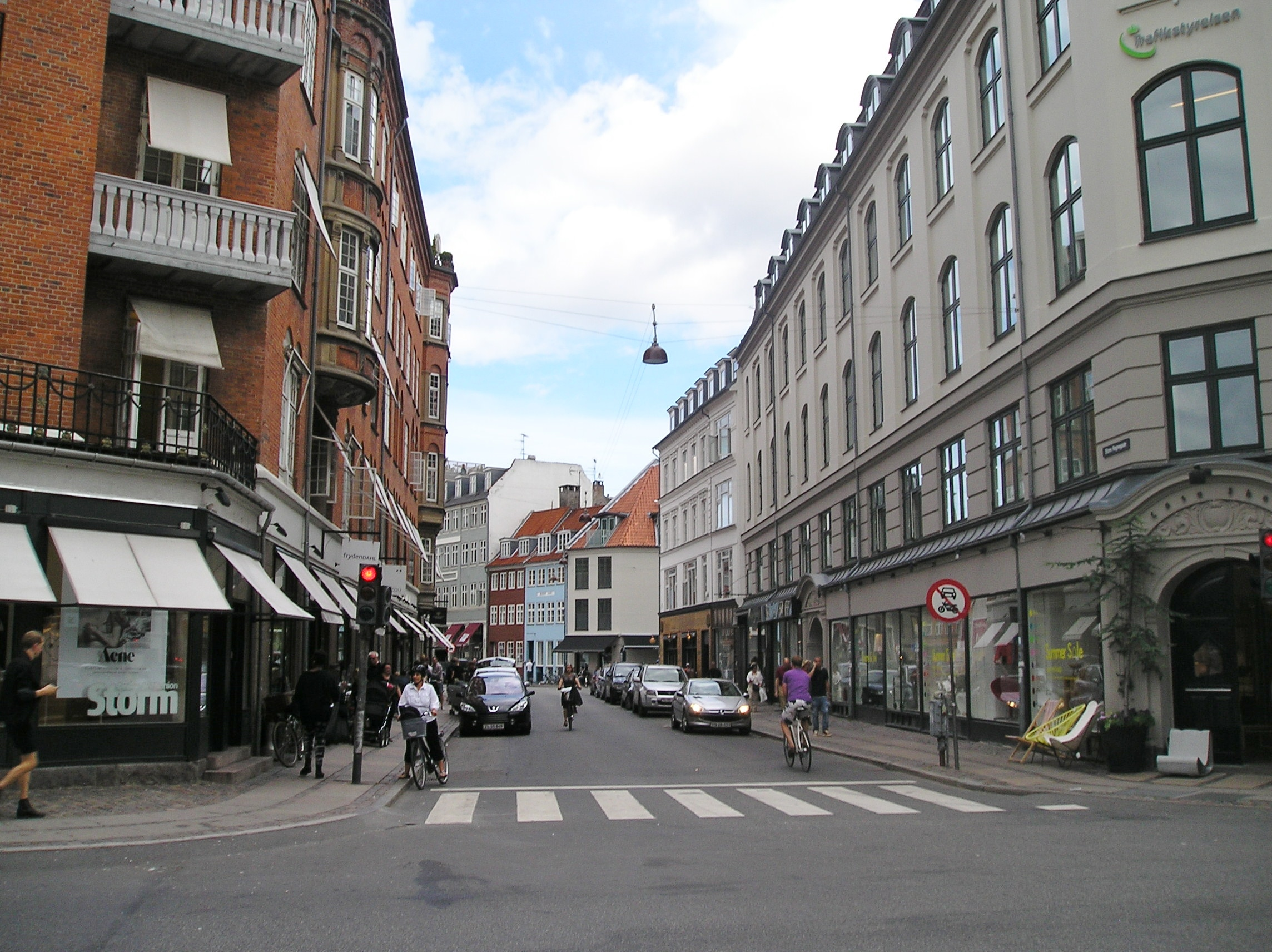 The street Store Regnegade in Copenhagen.